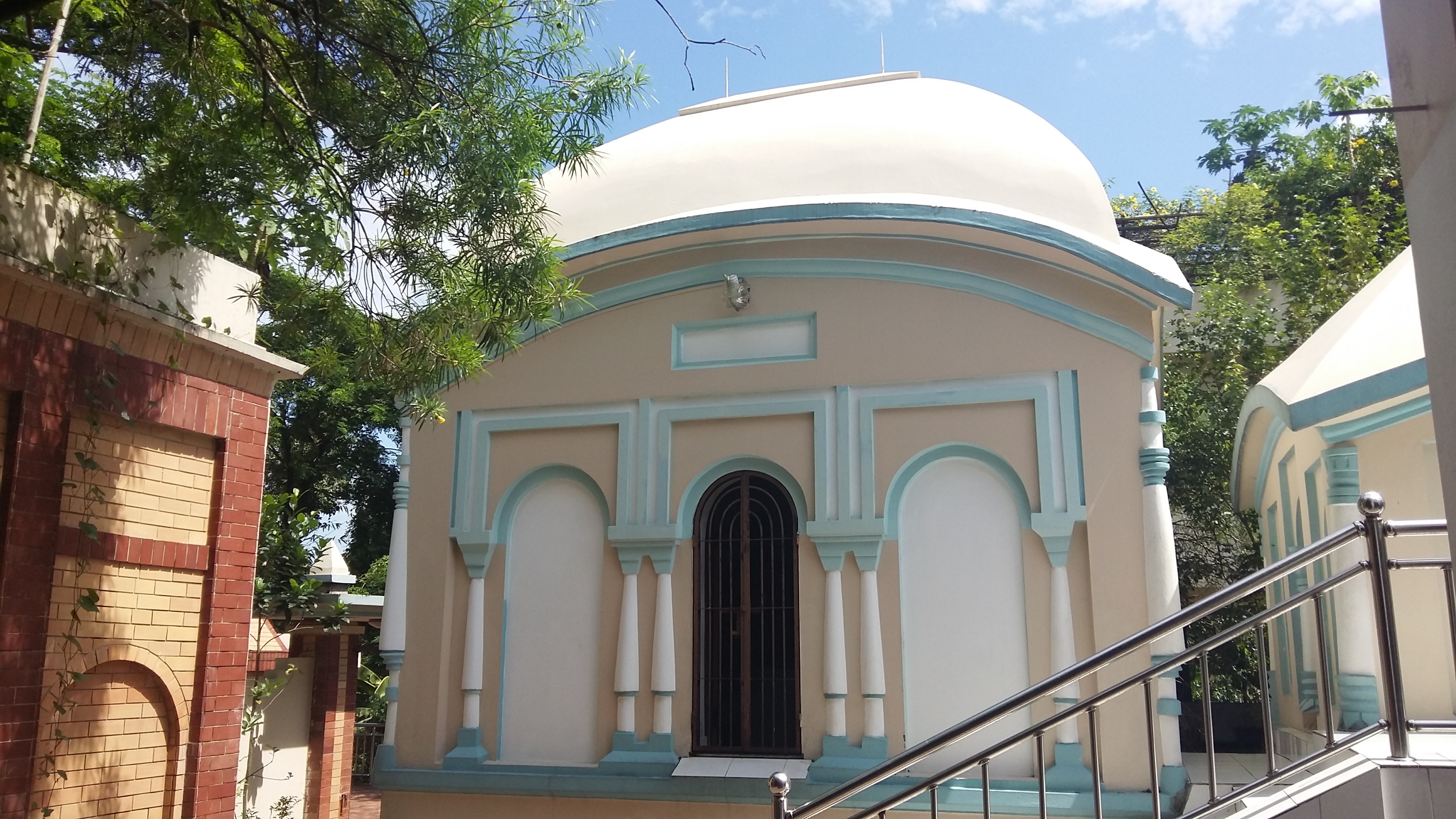 শ্রী চৈতন্য মন্দির । সিলেট জেলার গোলাপগঞ্জ থানার একটি স্থান ঢাকা দক্ষিণ । সিলেট-জকিগঞ্জ সড়কে গোলাপগঞ্জ হয়ে ৮ মাইল দূরে ঢাকাদক্ষিণ বাজার সংলগ্ন স্থানে হিন্দু ধর্মালম্বীদের মতে শ্রীমন মহাপ্রভুর পূণ্যধাম , কলিযুগের অবতার শ্রীচৈতন্য মহাপ্রভুর পৈতৃক বাড়ি । তিনি নবদ্বীপে জন্মলাভ করেছিলেন কিন্তু সন্যাস গ্রহনের পর এই পিতৃধামে এসেছিলেন । ঢাকাদক্ষিণের প্রাচীন প্রস্তর কারুকার্যময় পাহাড়িকা টিলাভুমির উপর নির্মিত মন্দির ও বিগ্রহ এবং সবোর্পরি তাঁর দাদীর বাড়ির প্রাকৃতিক পরিবেশ এখনো দর্শণাথীদের টেনে থাকে । প্রতিবছর আষাঢ় ও চৈত্রমাসে ' মেলা ' বসে ।